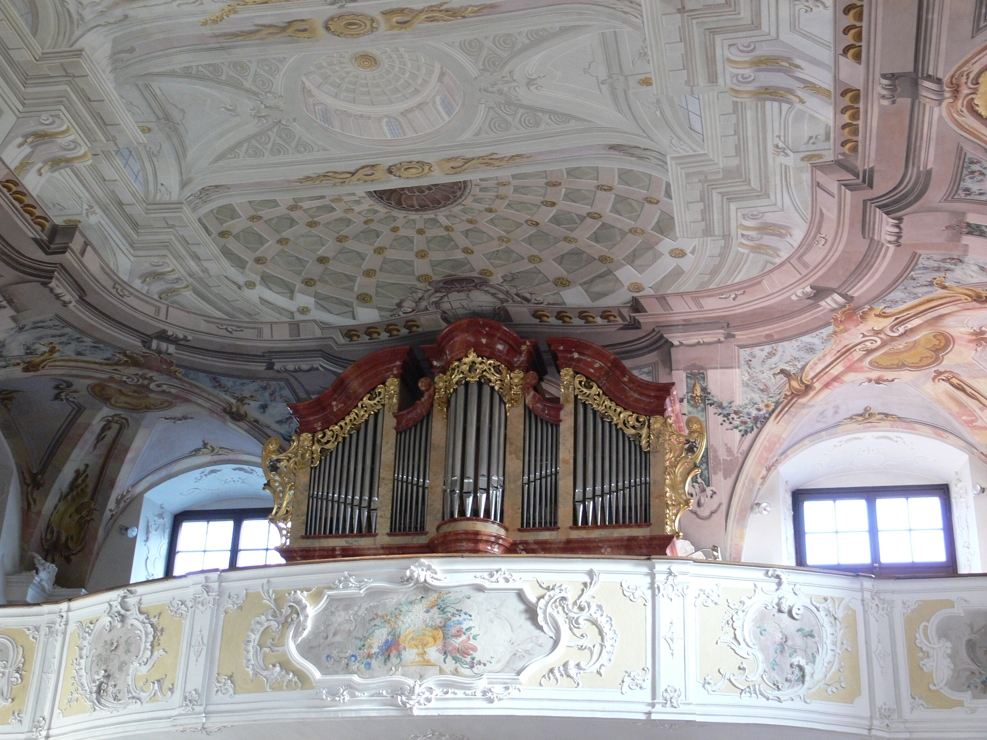 Schlosskirche (heute ev. Pfarrkirche), Neues Schloss Meersburg Deckengemälde von Gottfried Bernhard Göz, 1741 Stuck der Orgelempore von Carlo Pozzi und Werkstatt, 1759–1762 Orgel von Fa. Weigle, Echterdingen, 1978, op. 1316; barockisierendes Gehäuse von Victor Mezger jun., Überlingen